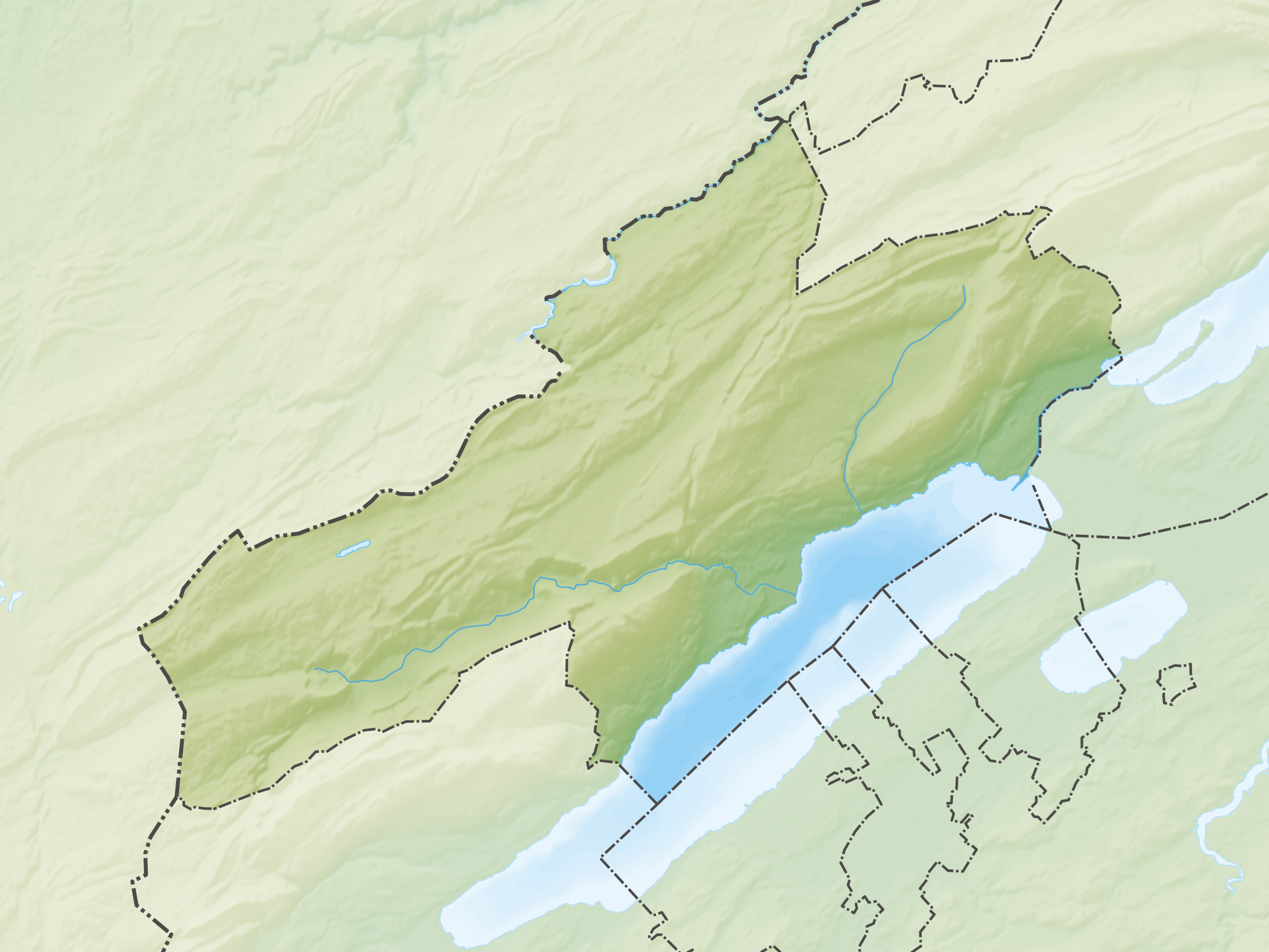 Reliefkarte des Kantons Neuenburg Topographischer Hintergrund: NASA Shuttle Radar Topography Mission (public domain). SRTM3 v.2.